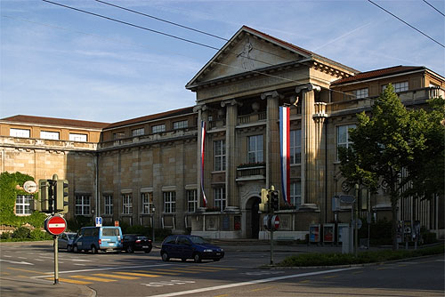 Kunstmuseum Winterthur (Nr. 03.1-5366)